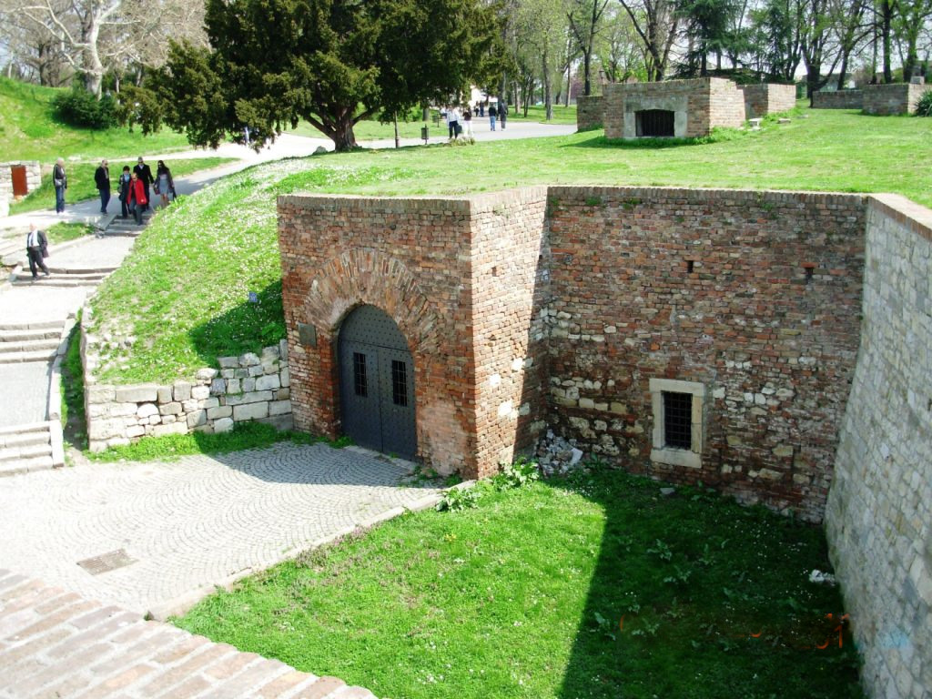 Улаз у Римски бунар на Калимегдану, Београд. Сликао Голдфингер